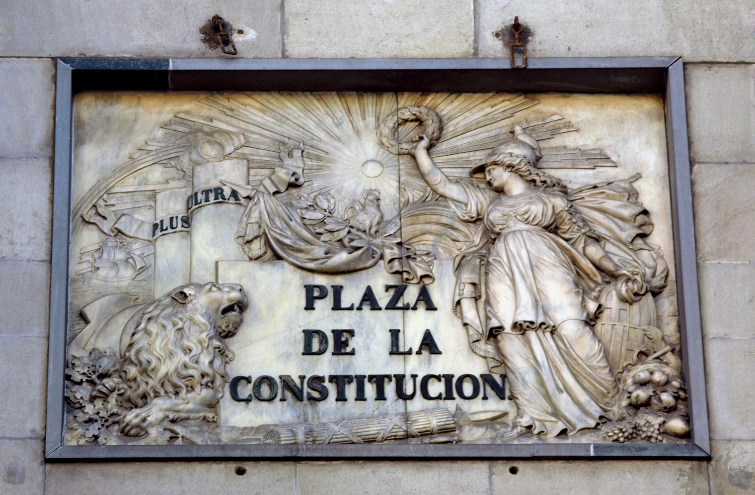 Ajuntament de Barcelona - Placa inaugurada el 1840, obra de Celdoni Guixà, situada a la façana neoclàssica. L'any 2012 el ple de l'ajuntament decidí retirar aquesta placa i finalment fou retirada l'agost de 2013.